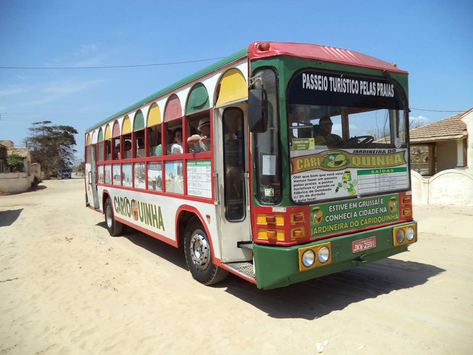 Ônibus turístico em Grussaí, São João da Barra, Brasil.